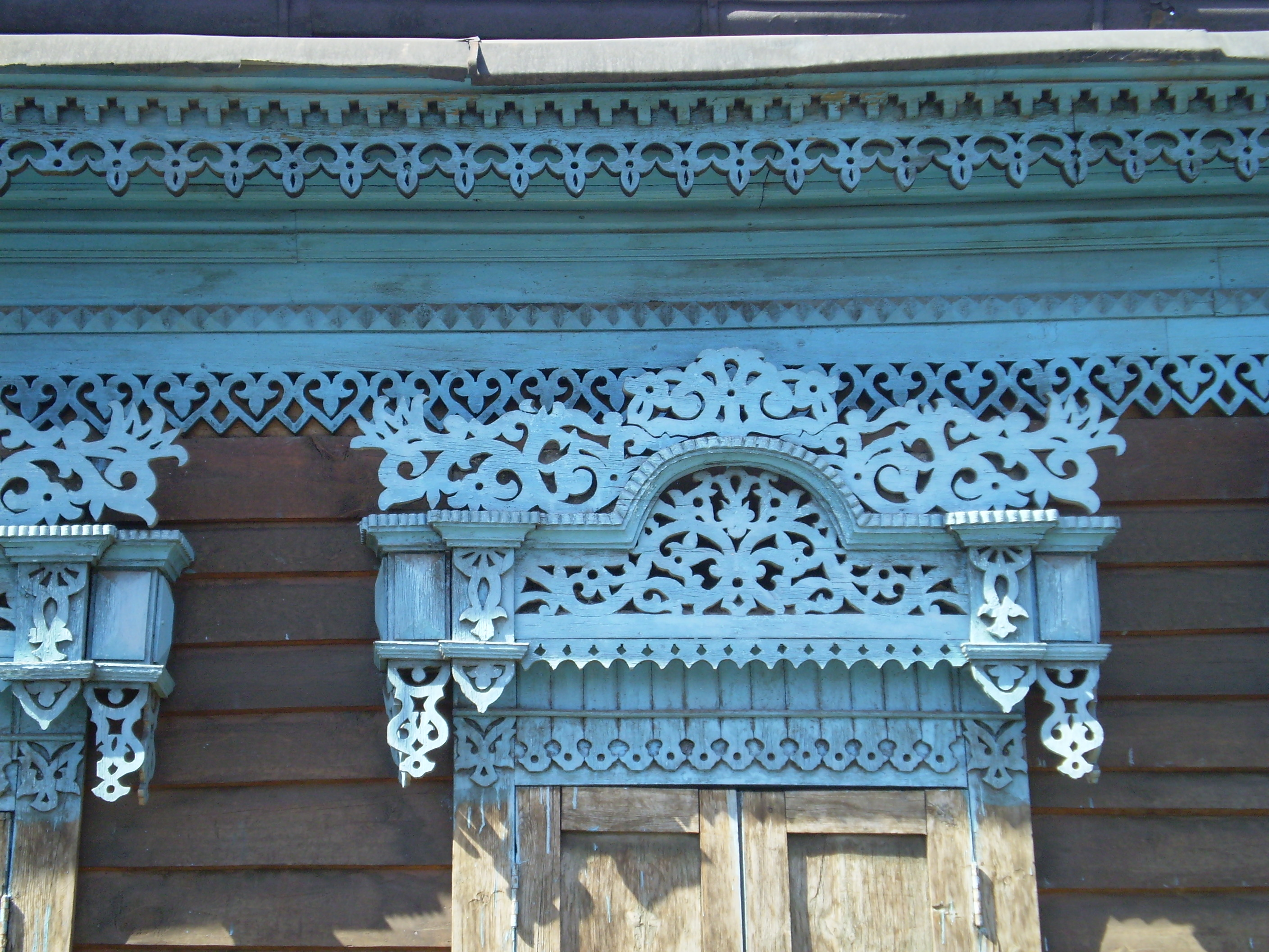 Усадьба крестьянина Г. И. Фиделя. Ул. Смолина, 35. Деталь наличника.